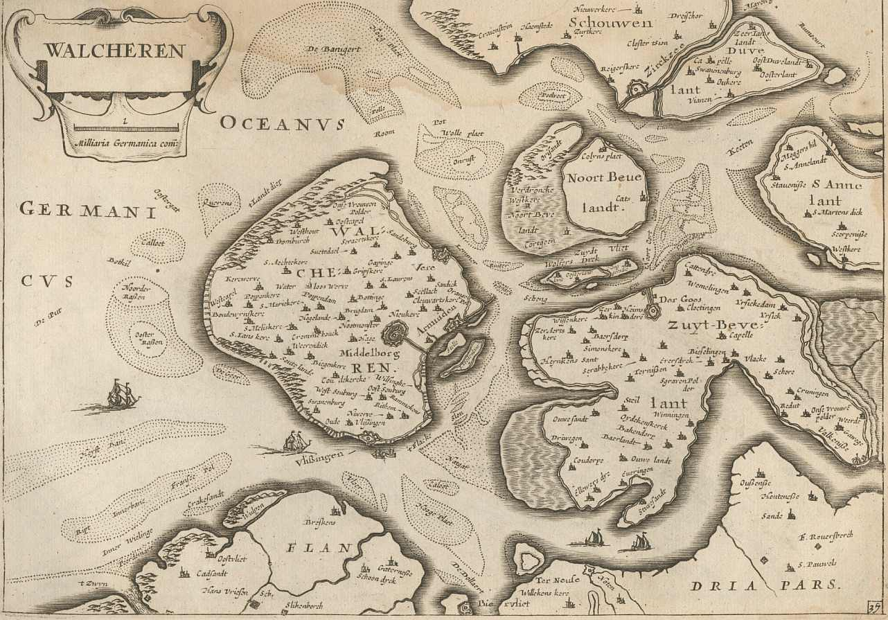 Walcheren, Noord- und Zuid-Beveland. Insel auf einem Kartenausschnitt von 1696.